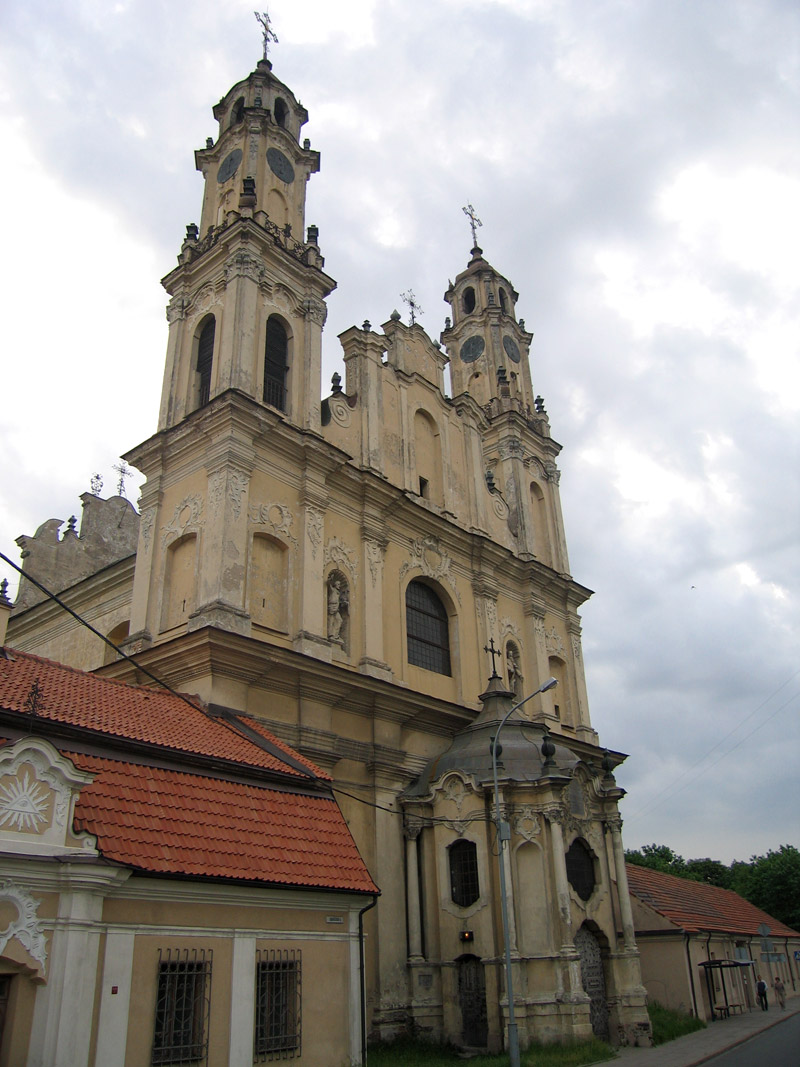 lt: Dangun įžengimo (Misionierių) bažnyčia